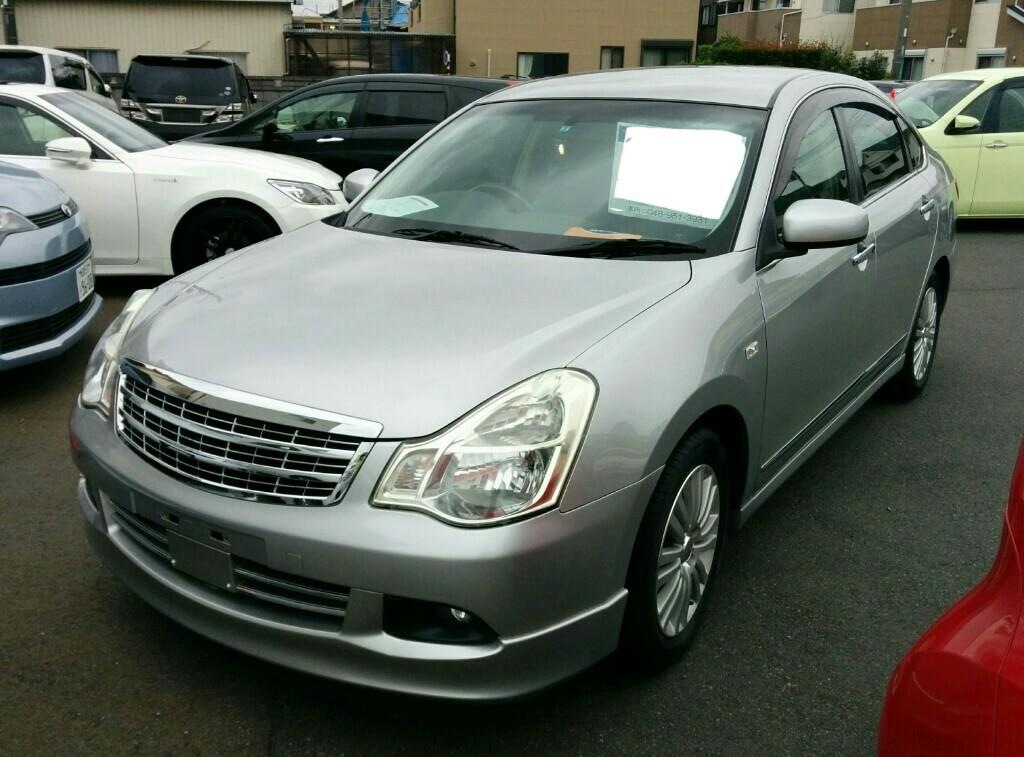 日産・シルフィ